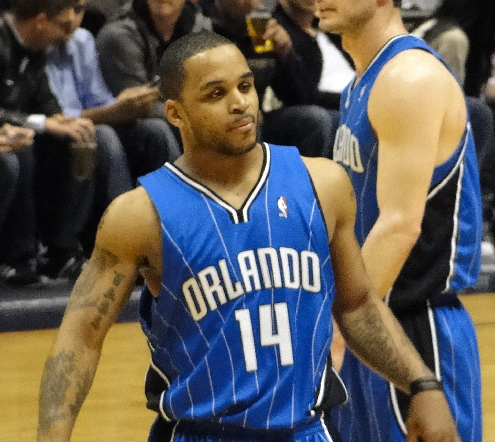 Orlando Magic Game